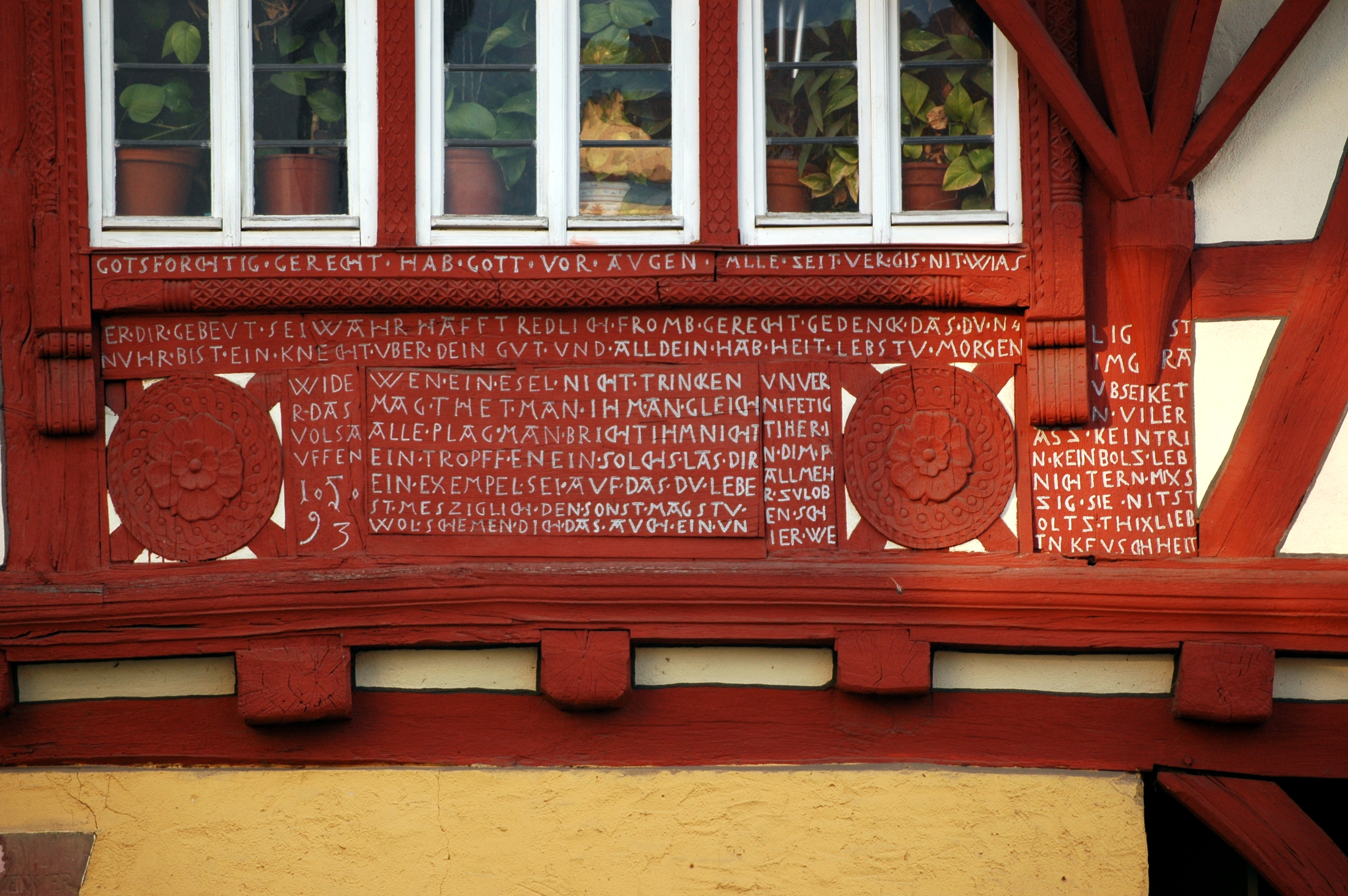 Alte Steigstraße 4 (Reilsheim)